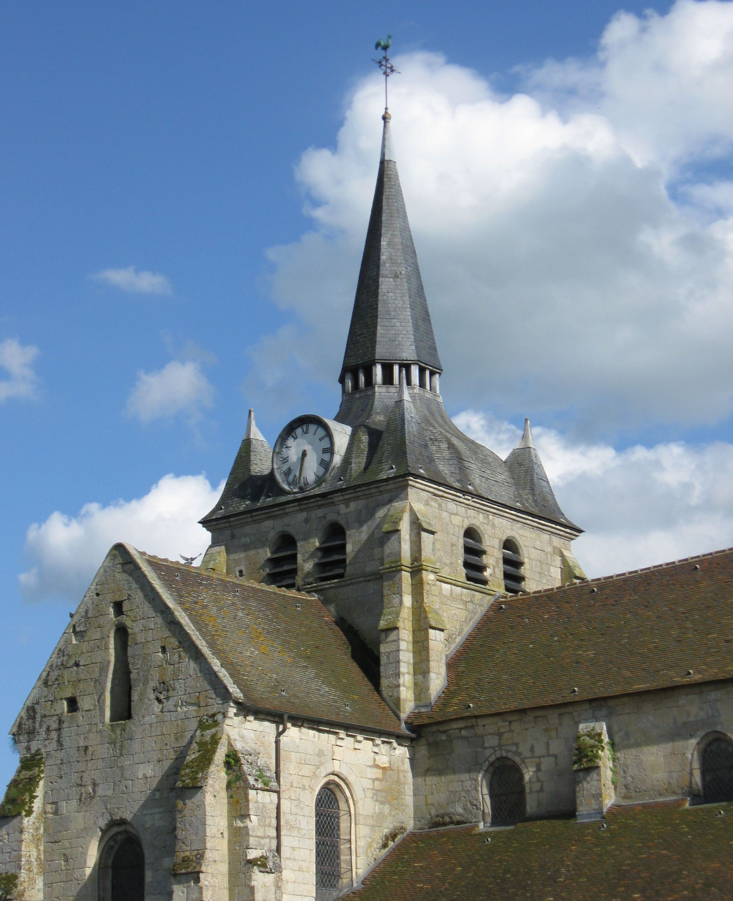 Clocher de l'église Saint-Martin de Mareuil-sur-Ourcq. (Oise, Picardie).